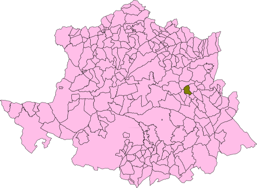 Almaraz